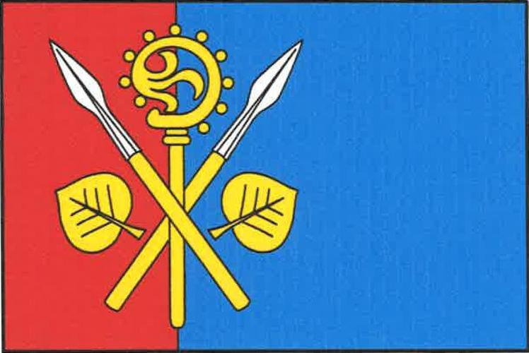 Strážiště, okres Mladá Boleslav, vlajka